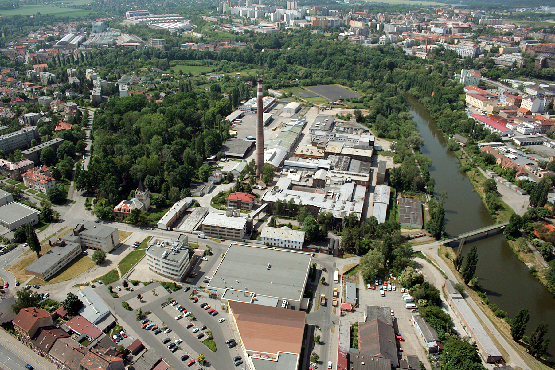 Papírna Slovany